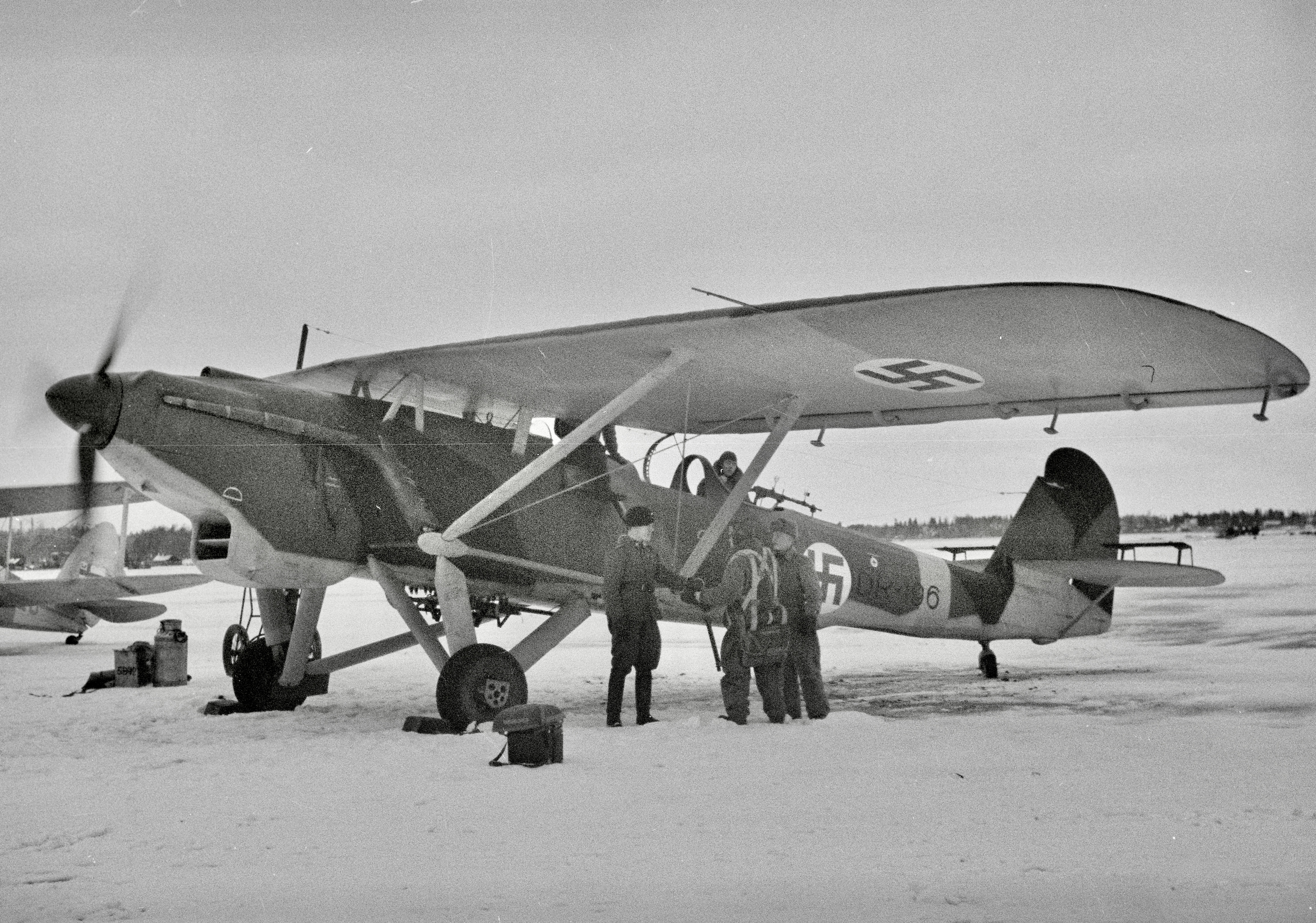 DR-kone lähdössä meritiedustelulennolle. (Kuvassa on Dornier Do 22K). Kuvauspaikka: Malmin lentokenttä